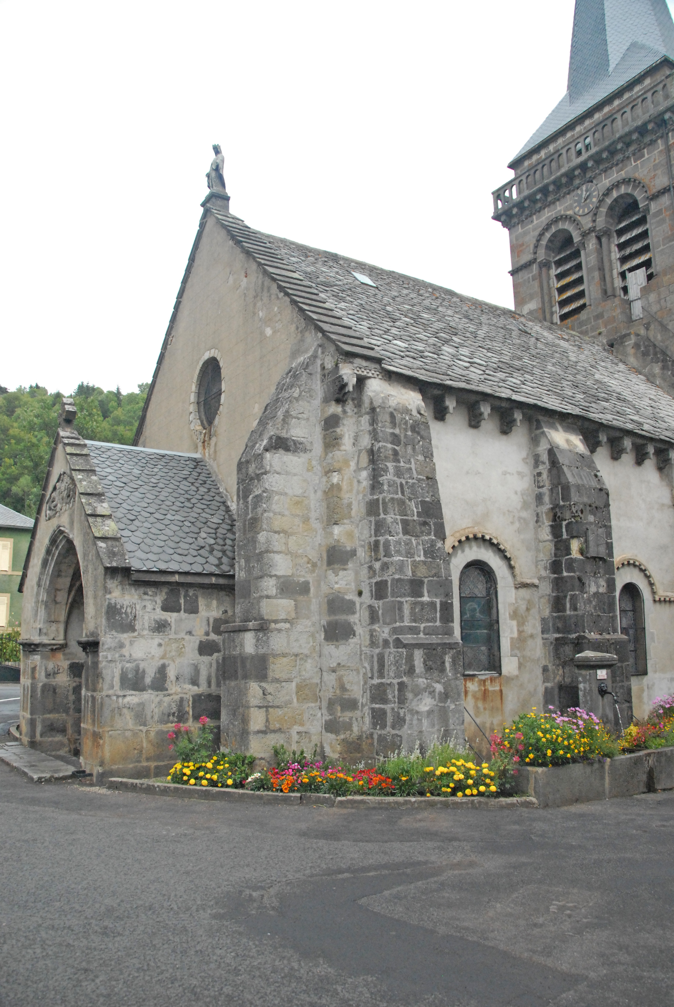 Dorfkirche Chambon-sur-Lac, Langhaus m. Narthex, v. SW